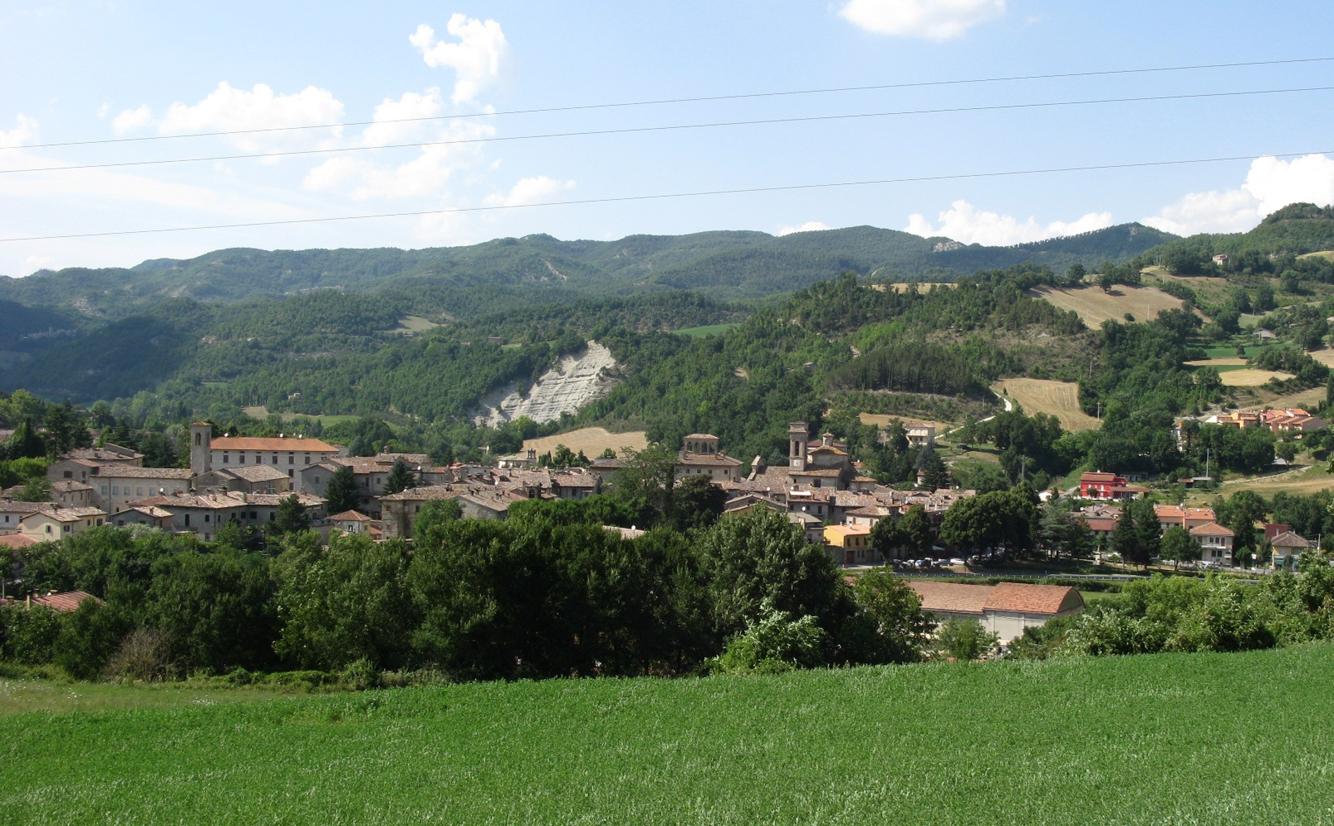 Panorama di Mercatello sul Metauro.